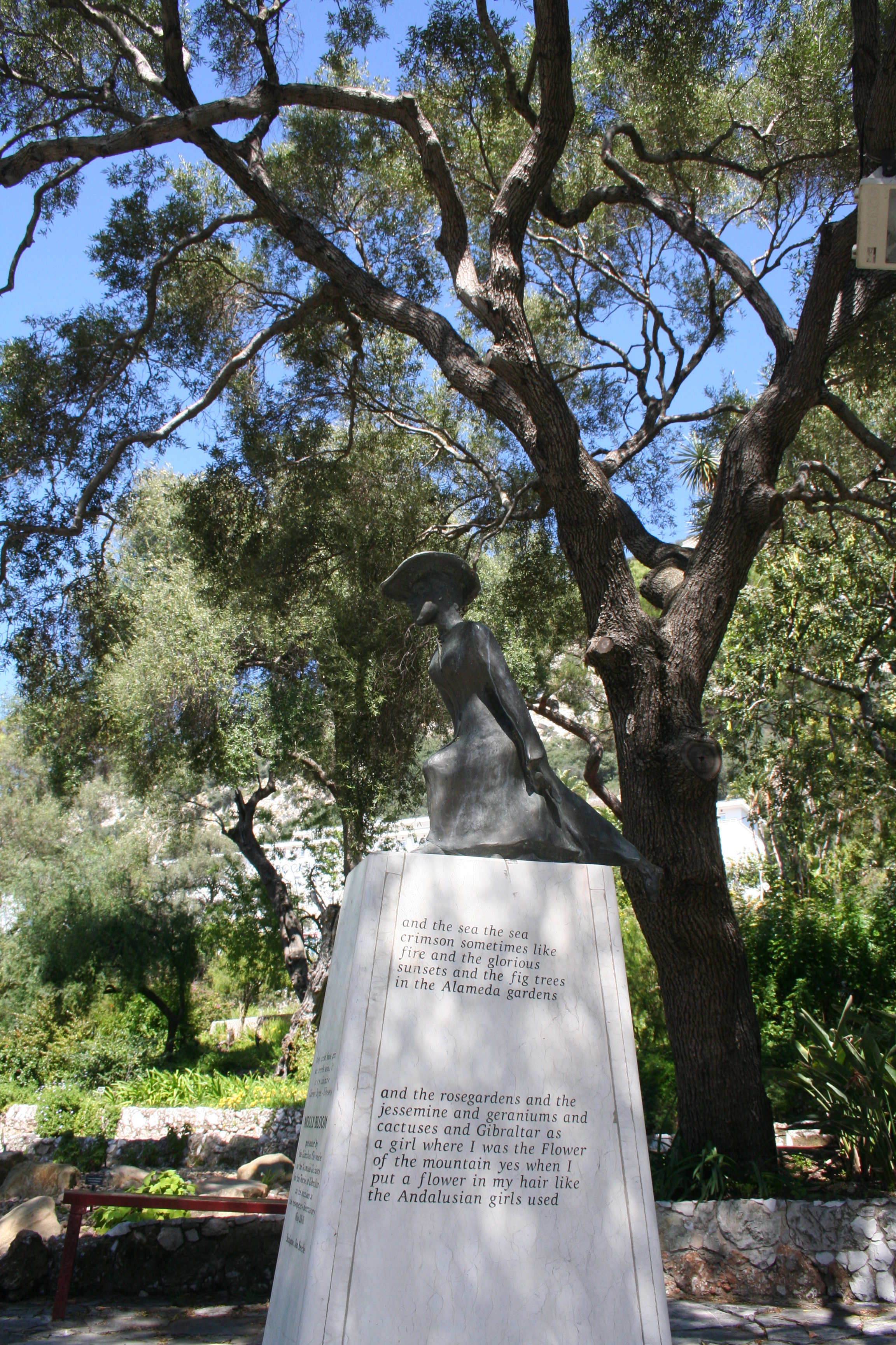 Escultura dedicada a Molly Bloom, el personaje creado por James Joyce en su novela 'Ulysses'.